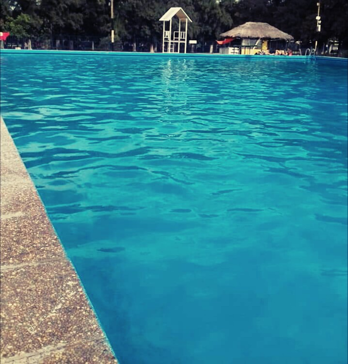 Pileta Olimpica